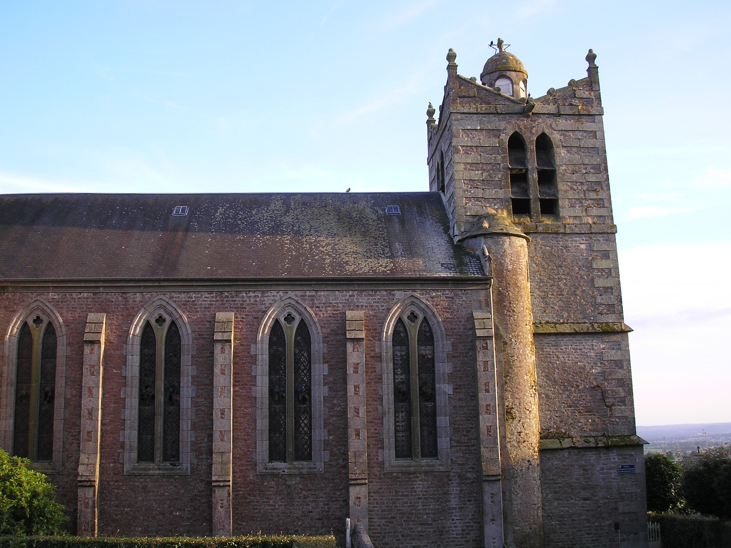 Le Bény-Bocage (Normandie, France). L'église Sainte-Honorine.